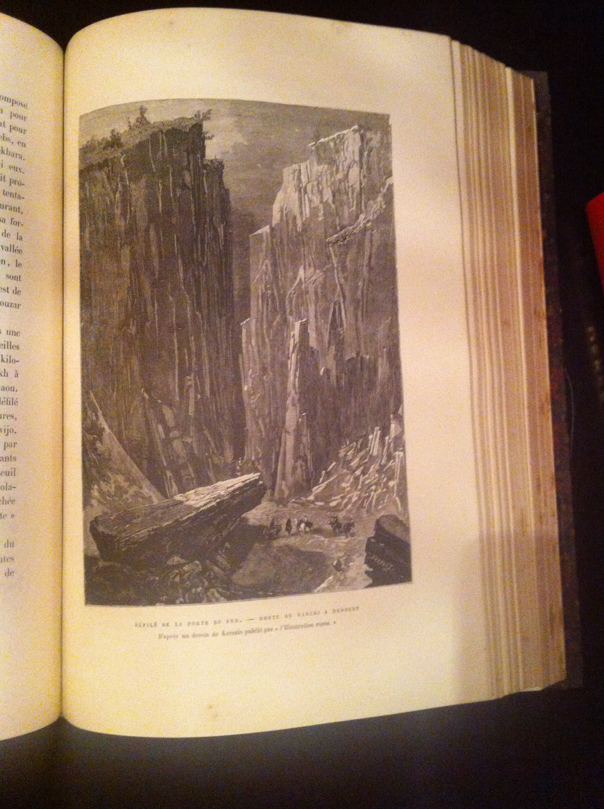 Wood engraving, p.503. From 'Nouvelle Géographie Universelle, La terre et les hommes', Part VI, 'L'Asie Russe', Édition Élisée reclus, Paris, 1881